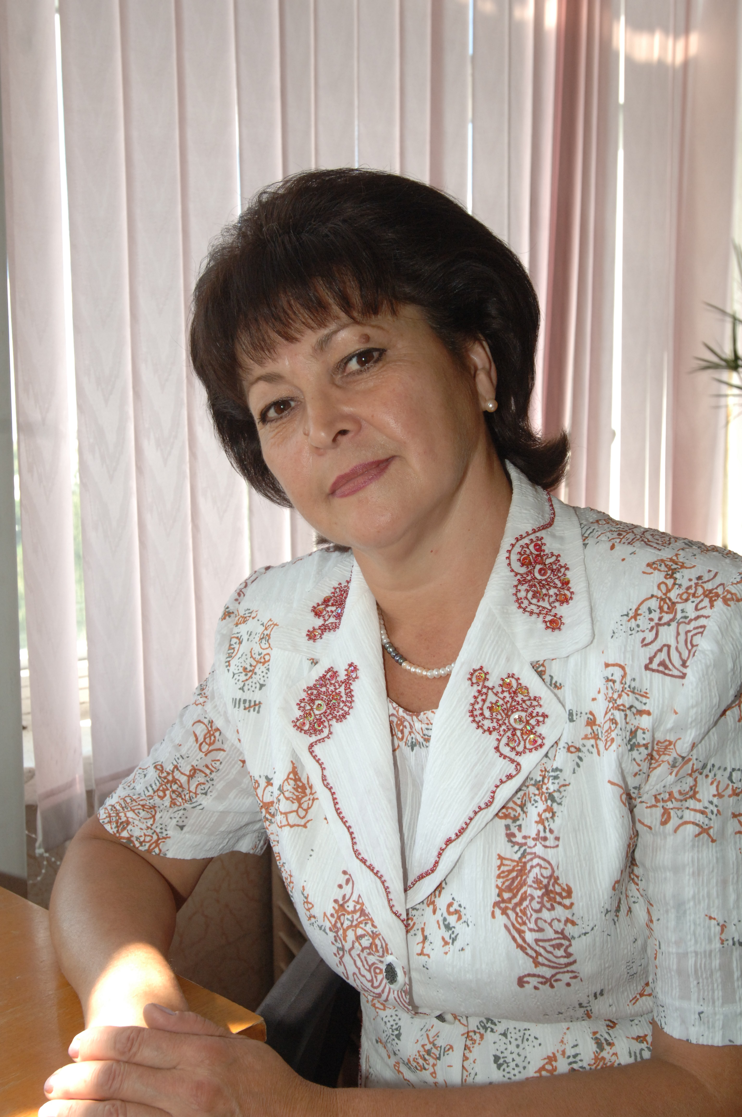 Башҡортса: Фәниә Ғәбиҙуллина – журналист, шағир һәм яҙыусы, Рәсәй Федерацияһының һәм Башҡортостан Республикаһының Журналистар (1999) һәм Яҙыусылар (2009) союздары ағзаһы, Башҡортостандың атҡаҙанған матбуғат һәм киң мәғлүмәт хеҙмәткәре (2008). Наил Акмеев архивынан